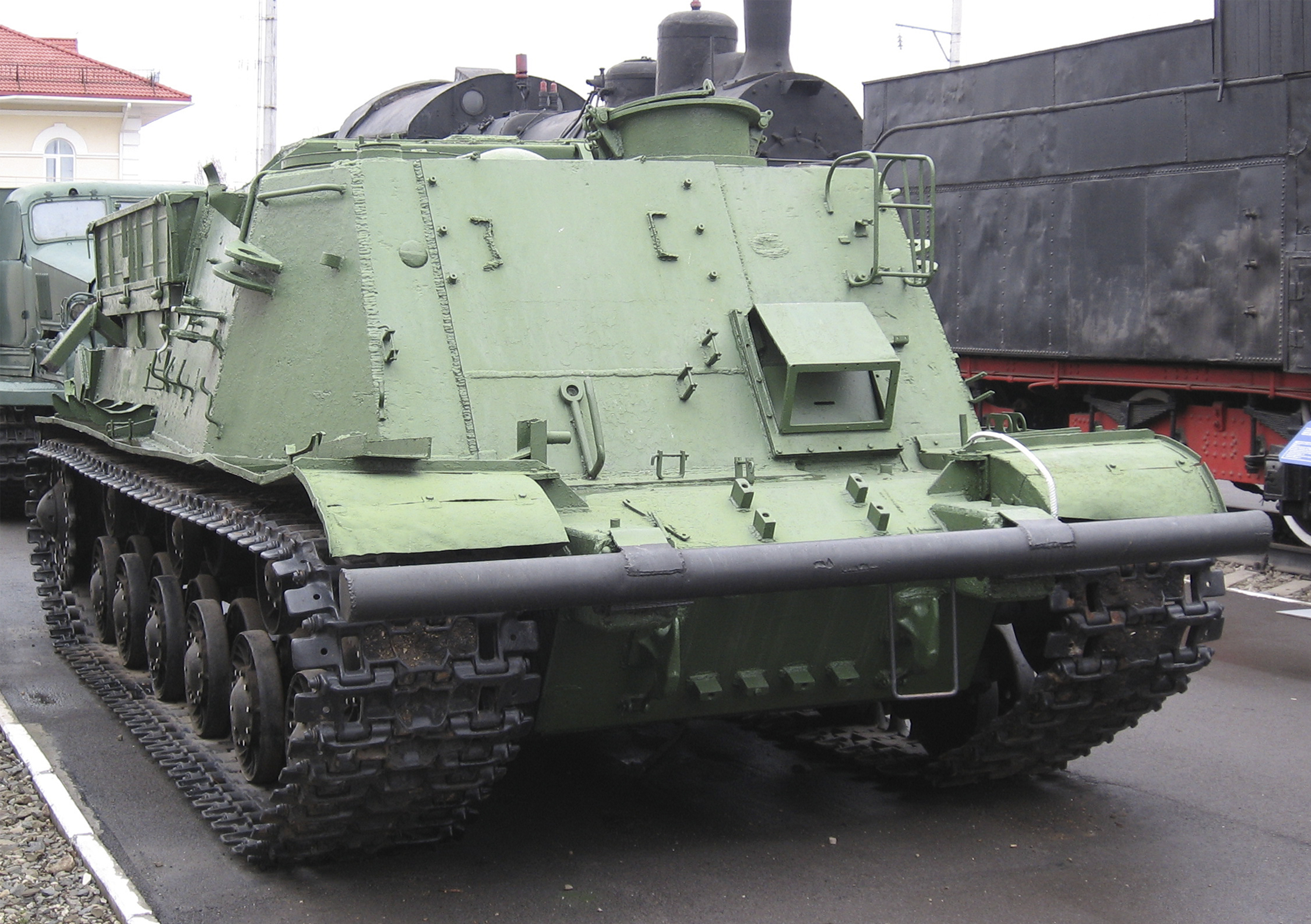 Построен в 1952 году